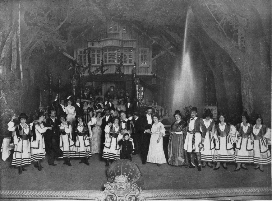 Szenenbild (Finale des II. Akts) aus der Operette „Cousin Bobby“ des Komponisten Karl Millöcker, aus der Aufführung im Theater des Westens in Berlin, 1907